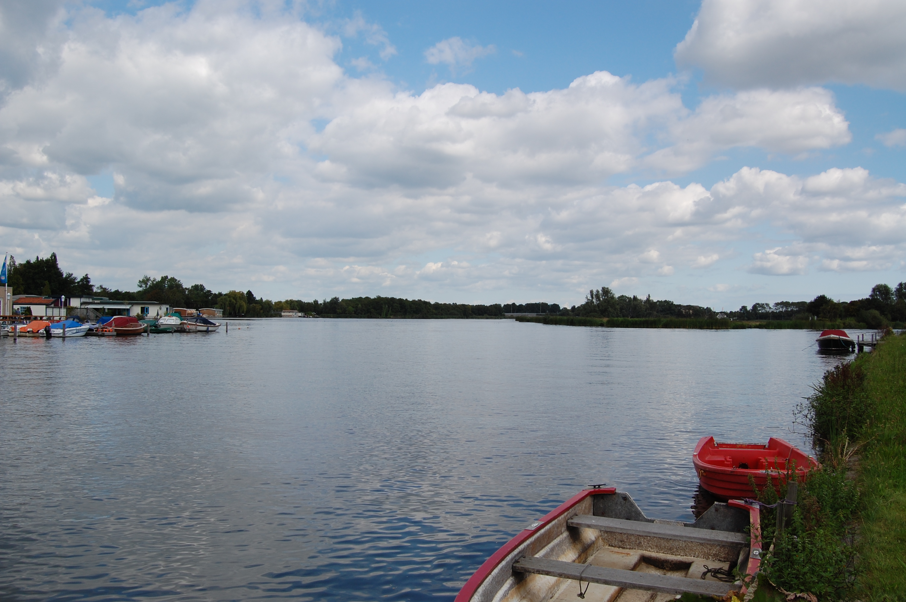 Buiten Liede (rivier) bij de Ringvaart van de Haarlemmermeerpolder